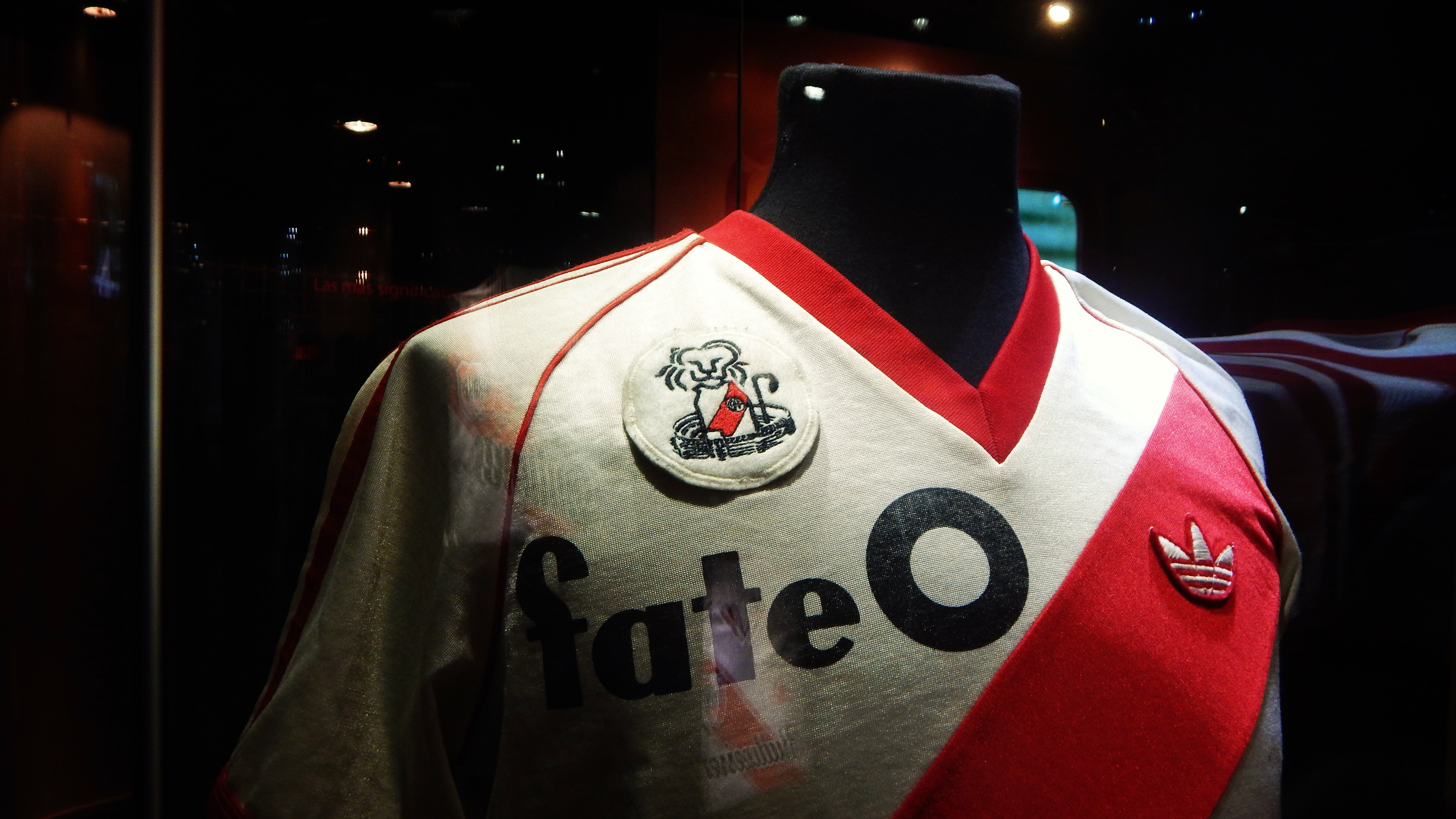 Camiseta de Américo Gallego del Club Atlético River Plate de 1985, echa por Adidas, en el Museo River Plate.